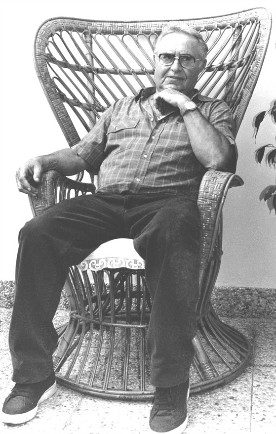 Il fumettista Stelio Fenzo, disegnatore del settimanale Il Giornalino e dei tascabili Infernal e Jungla